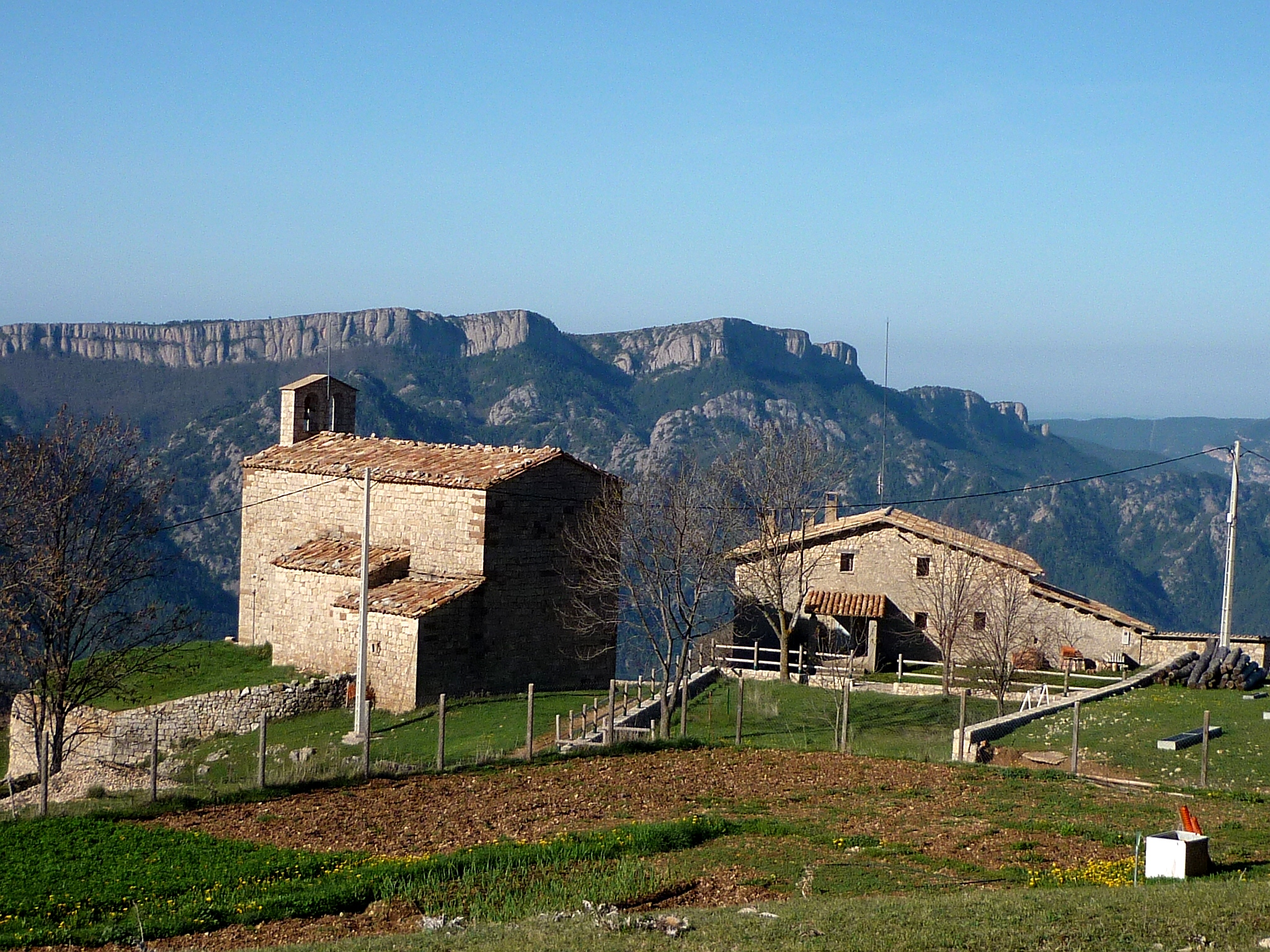 Església de Sant Pere de Montcalb (Guixers), amb els cingles de Busa al fons